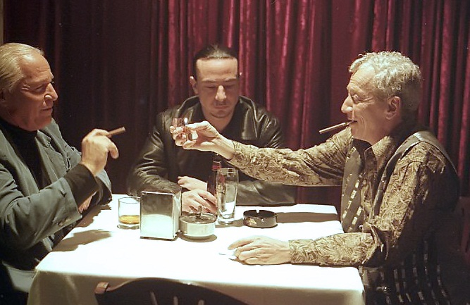 מימין מוני מושונוב, משמאל עזרא כפרי, בסרטו של יוסף פיצ'חדזה בסמה מוצ'ו, 2001